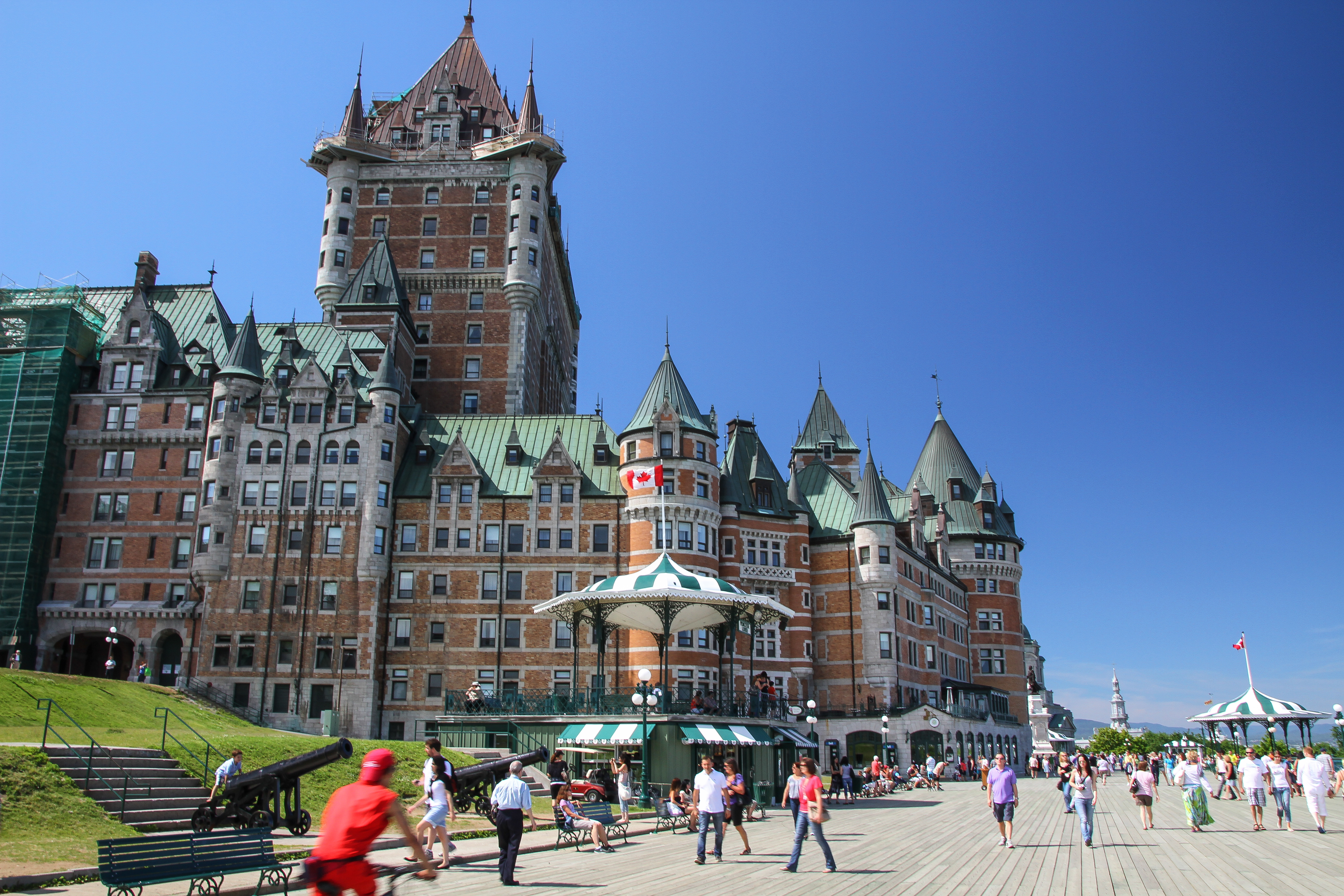 La terrasse Dufferin et le Château Frontenac, Québec